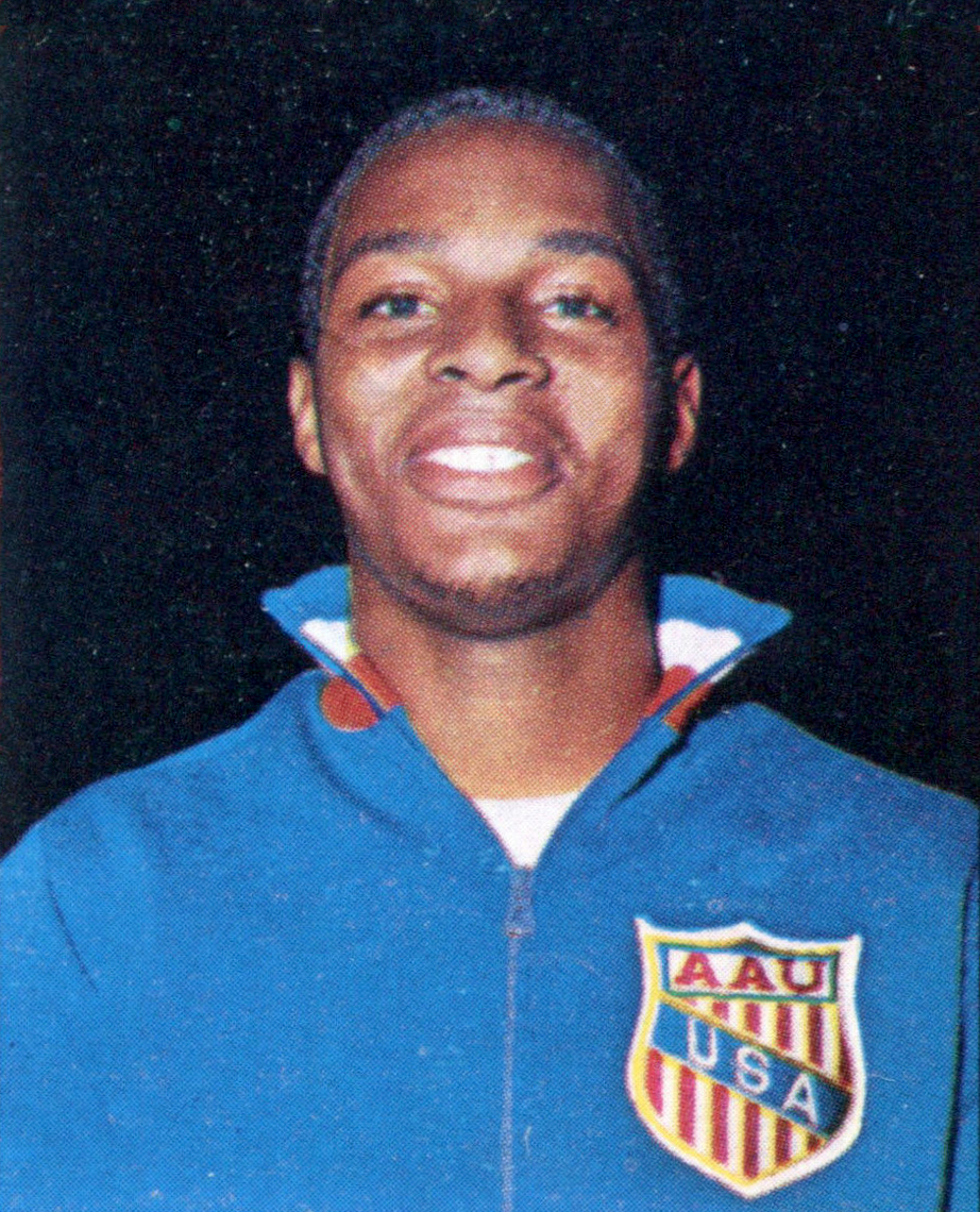 CAMPIONI DELLO SPORT 1968/69-n. 45 - DAVENPORT -USA-Rec